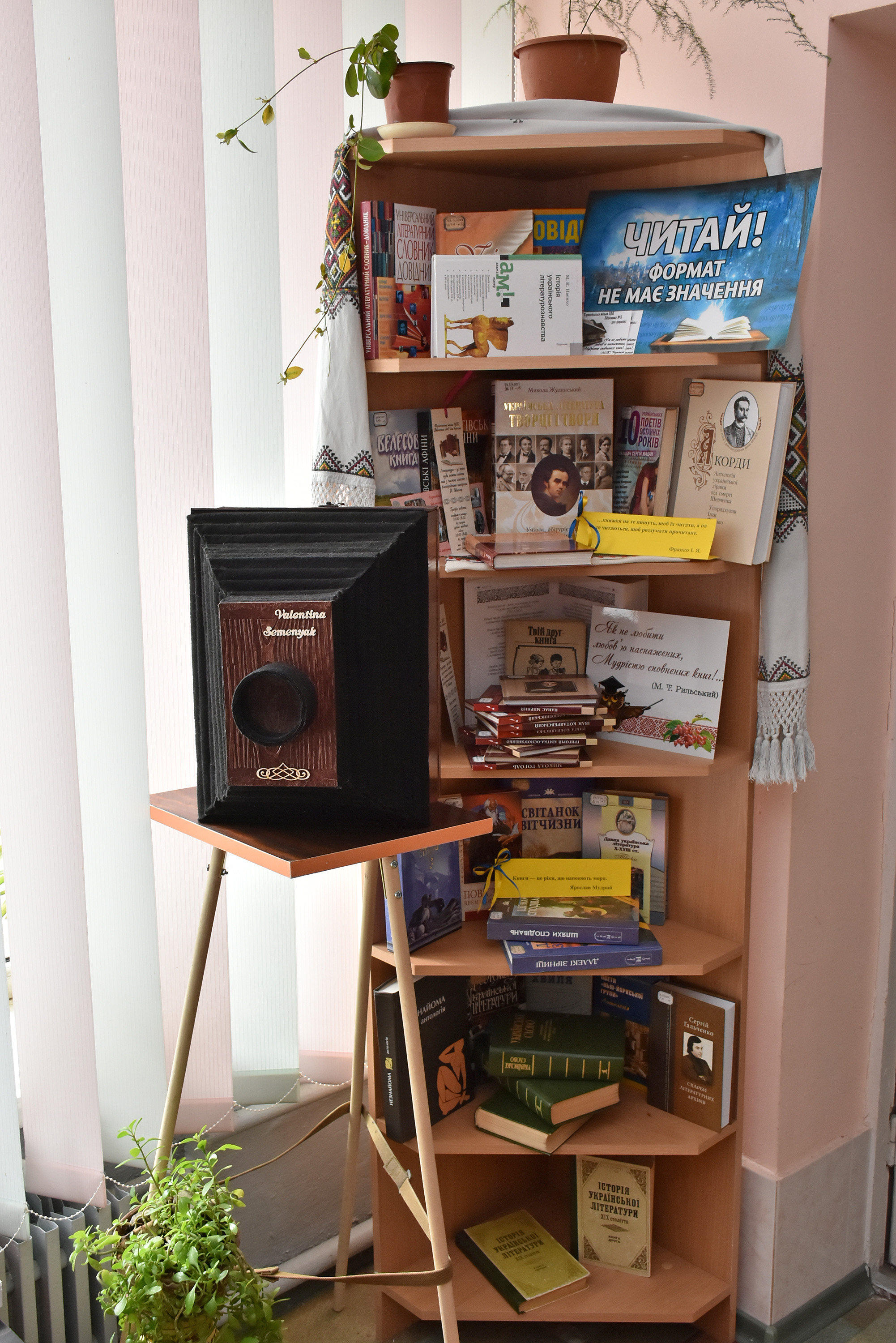 Бібліотека № 5 для дорослих Тернопільської міської централізованої бібліотечної системи.